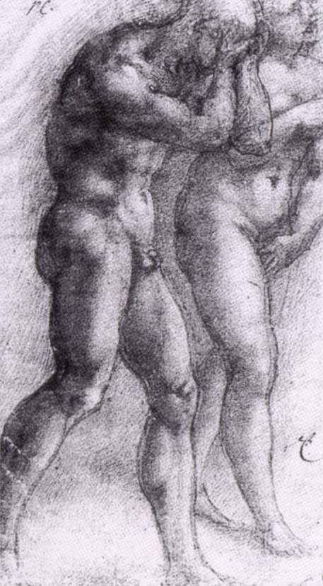 Michelangelo, cacciata dei progenitori, louvre.jpg